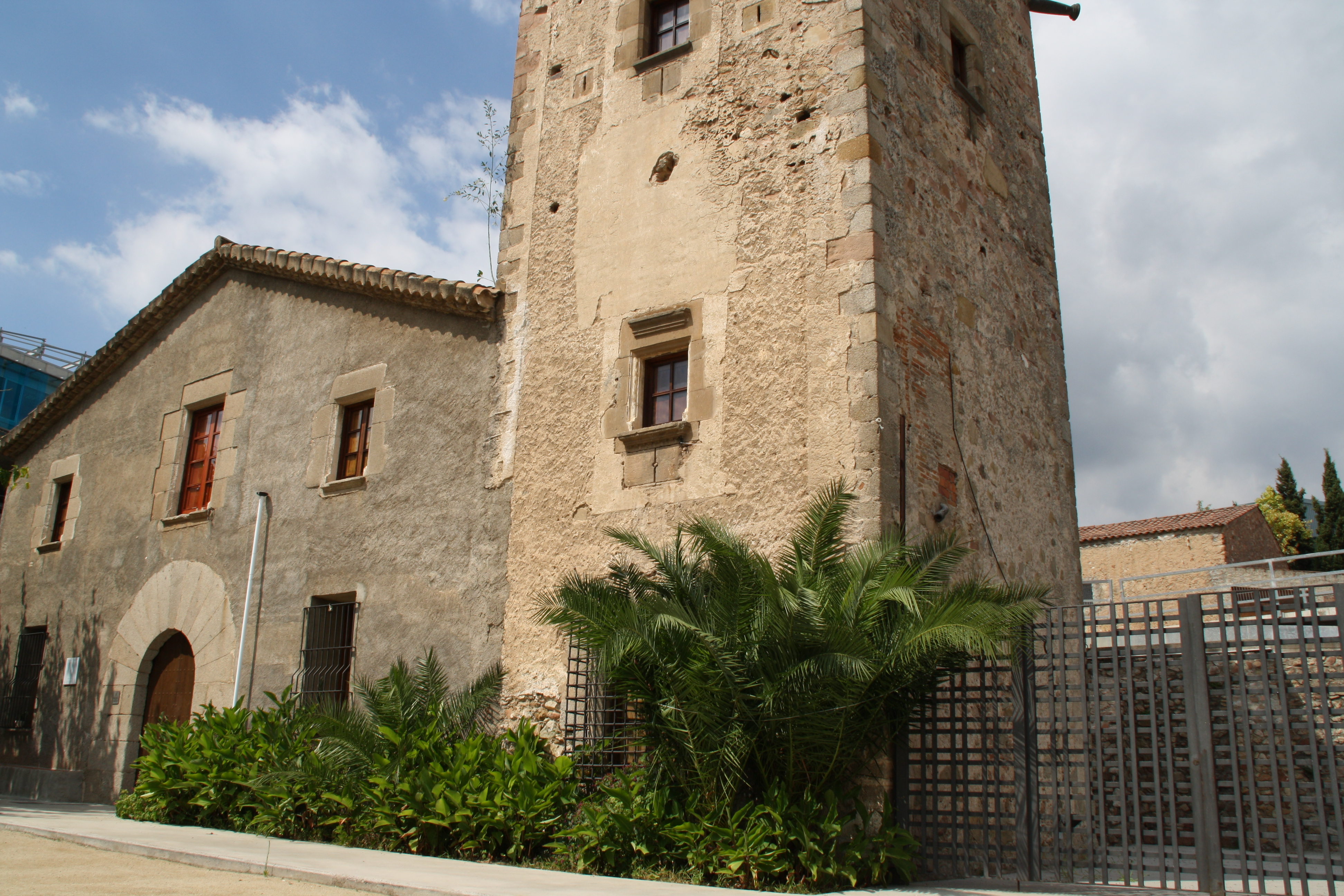 Vista general de Can Canyadó, a Badalona.